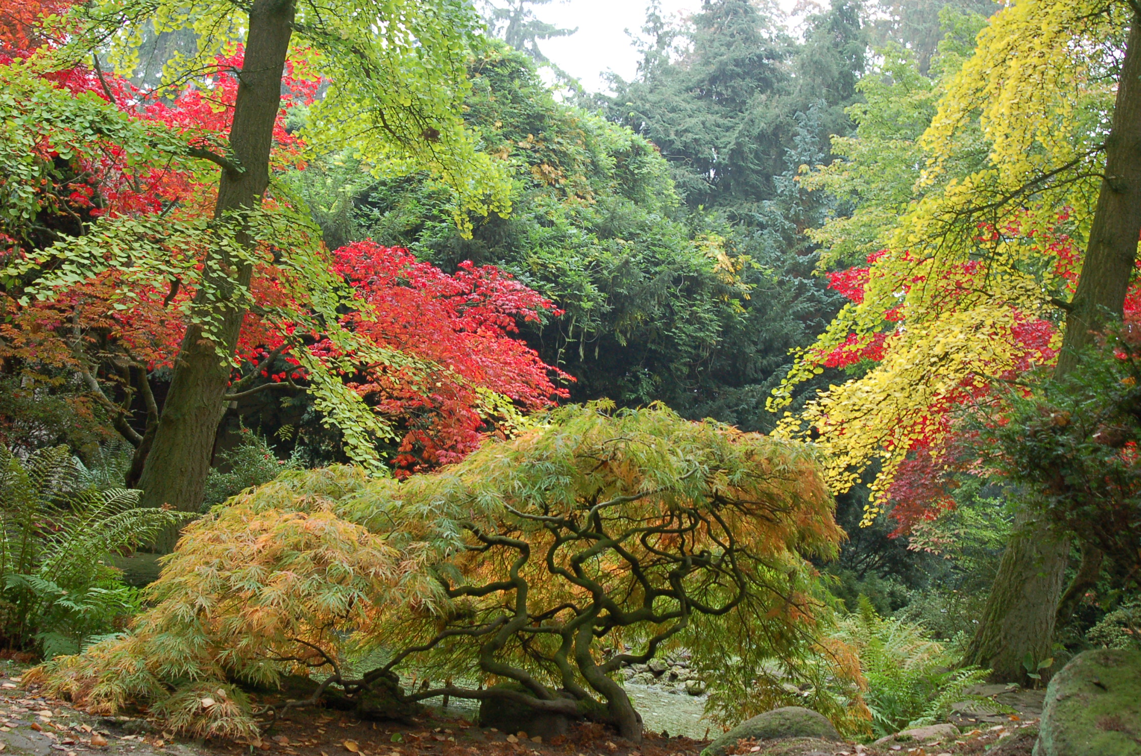 Ogród Japoński w Ogrodzie Dendrologicznym w Przelewicach